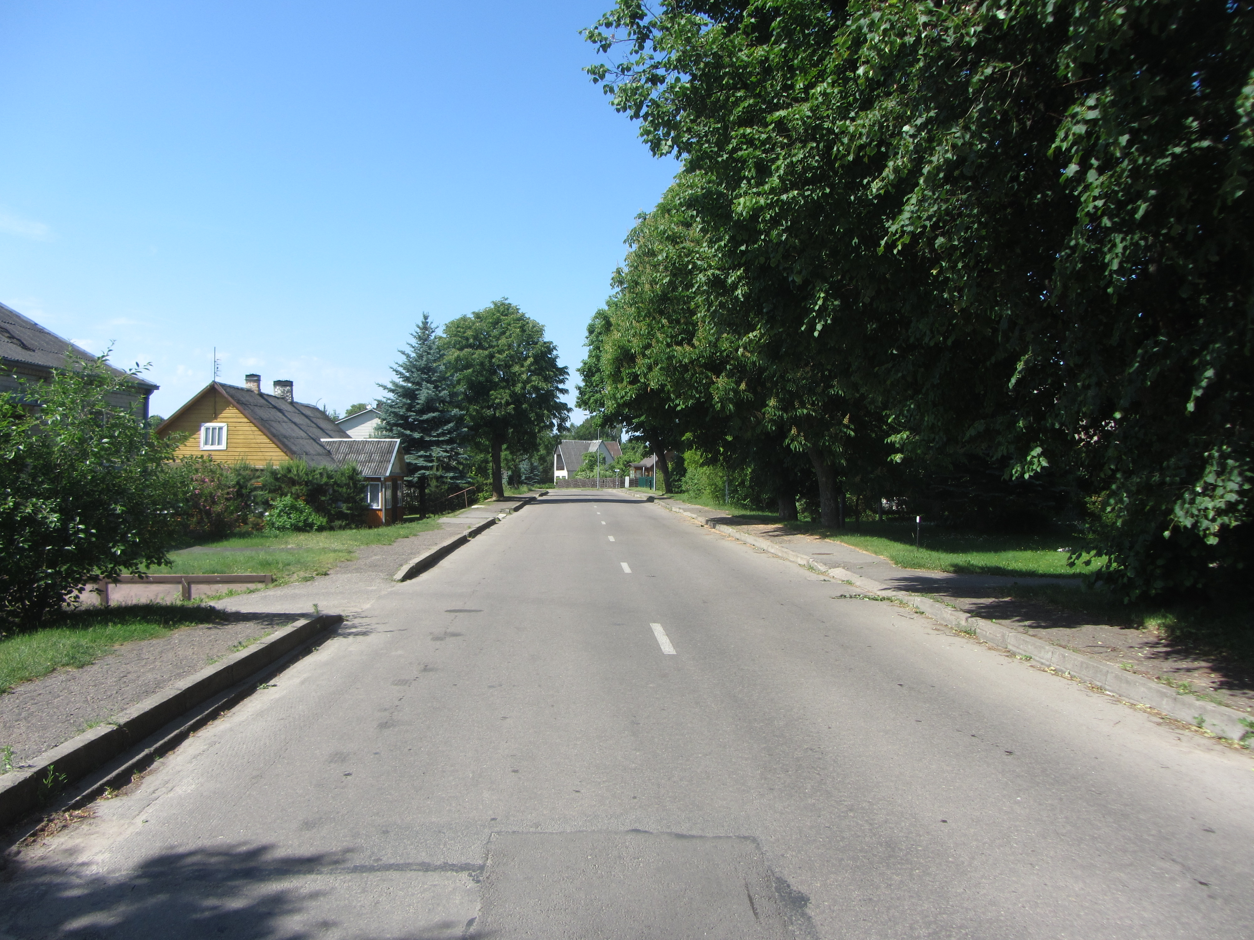 Rumšiškės, Lithuania